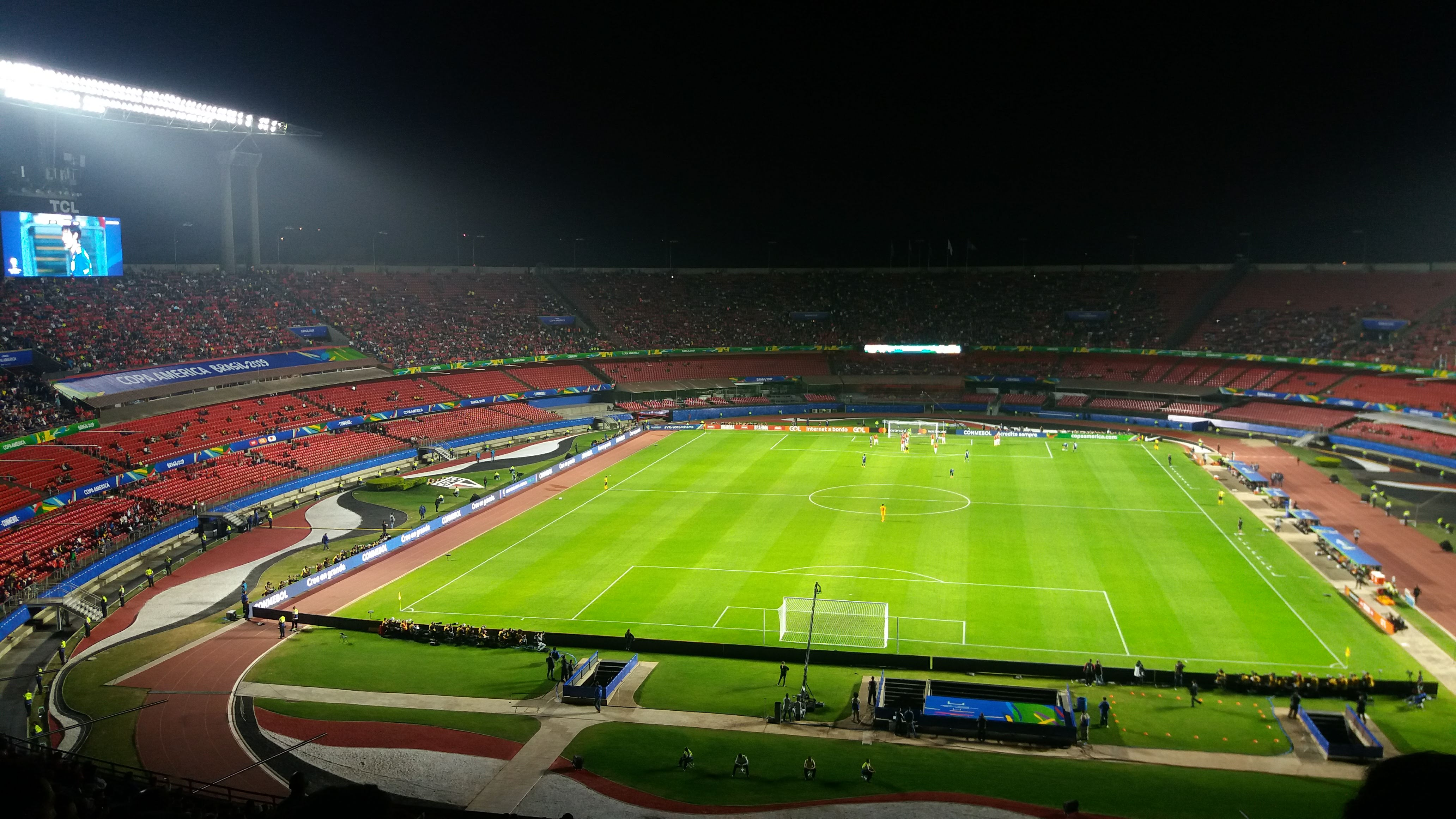 Jogo de futebol na Copa América, entre Chile (4) e Japão (0), realizado no Morumbi, São Paulo